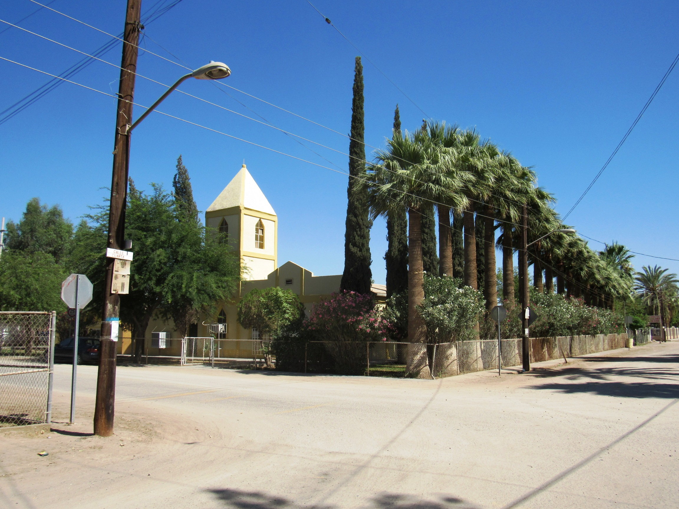 Una calle del ejido Querétaro o poblado Hechicera enmarcando una iglesia de la localidad